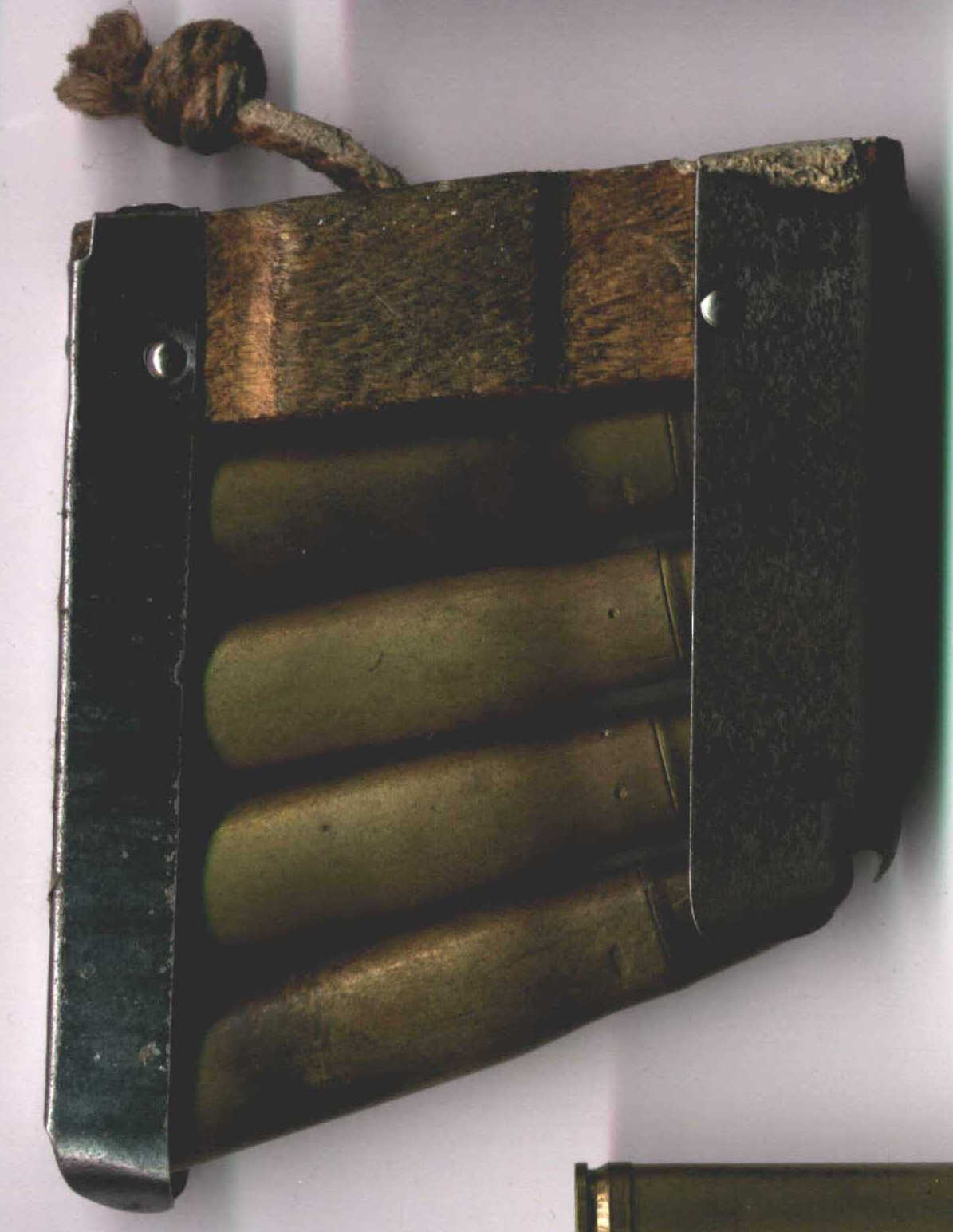 4-strelni okvir z naboji 10,4x47 R Vetterli.